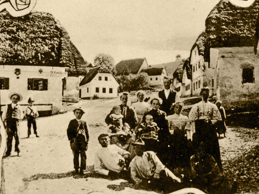 Razglednica Studenca na Blokah.